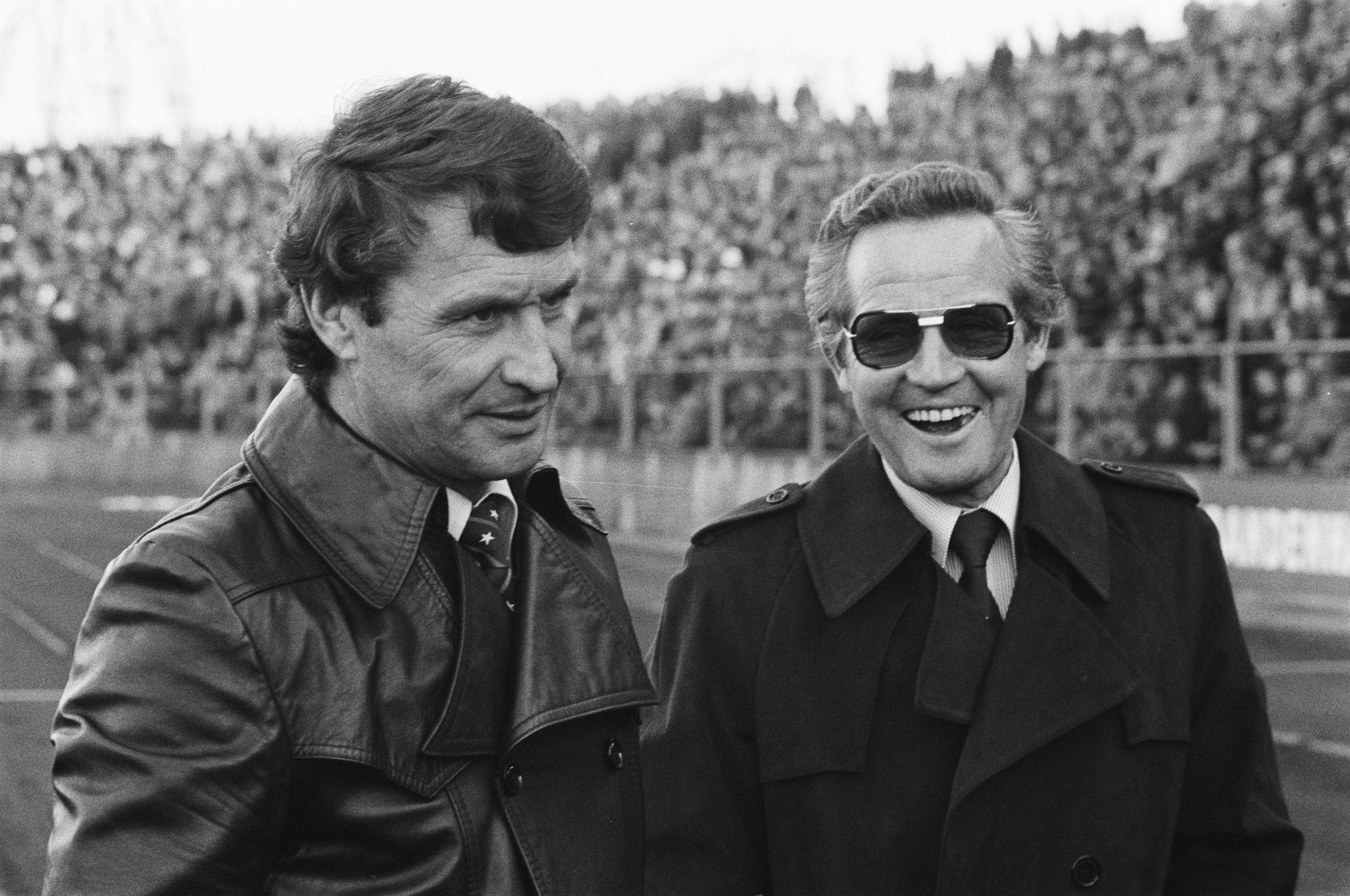 Collectie / Archief : Fotocollectie Anefo Reportage / Serie : [ onbekend ] Beschrijving : AZ67 tegen FC Twente (halve finale KNVB-beker) in Den Bosch ; Spitz Kohn (l) en Klaas Molenaar Datum : 27 april 1977 Locatie : Den Bosch Trefwoorden : sport, voetbal Persoonsnaam : Kohn, Spitz Instellingsnaam : FC Twente Fotograaf : Suyk, Koen / Anefo Auteursrechthebbende : Nationaal Archief Materiaalsoort : Negatief (zwart/wit) Nummer archiefinventaris : bekijk toegang 2.24.01.05 Bestanddeelnummer : 929-1482